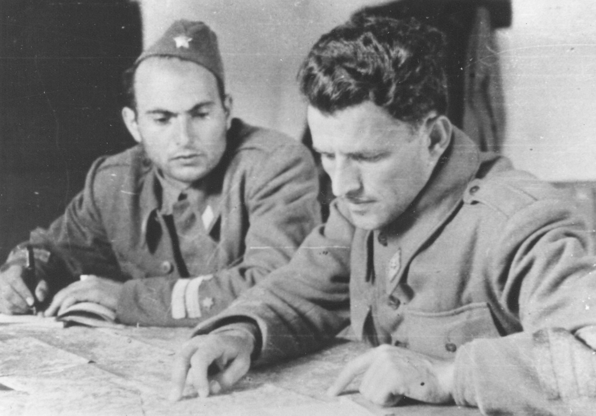 Srpskohrvatski / српскохрватски: Načelnik štaba Savo Drljević i komandant operativne grupe divizija Peko Dapčević pripremaju plan za proboj u Srbiju. U blizini Ibra 1. avgusta 1944.